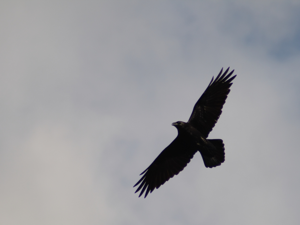 Kolkrabe